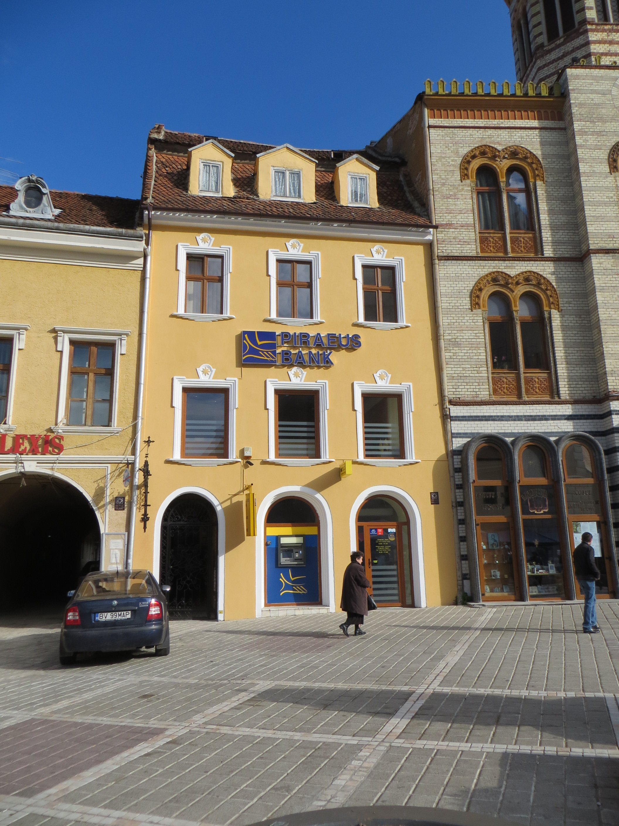 Casa Vasady